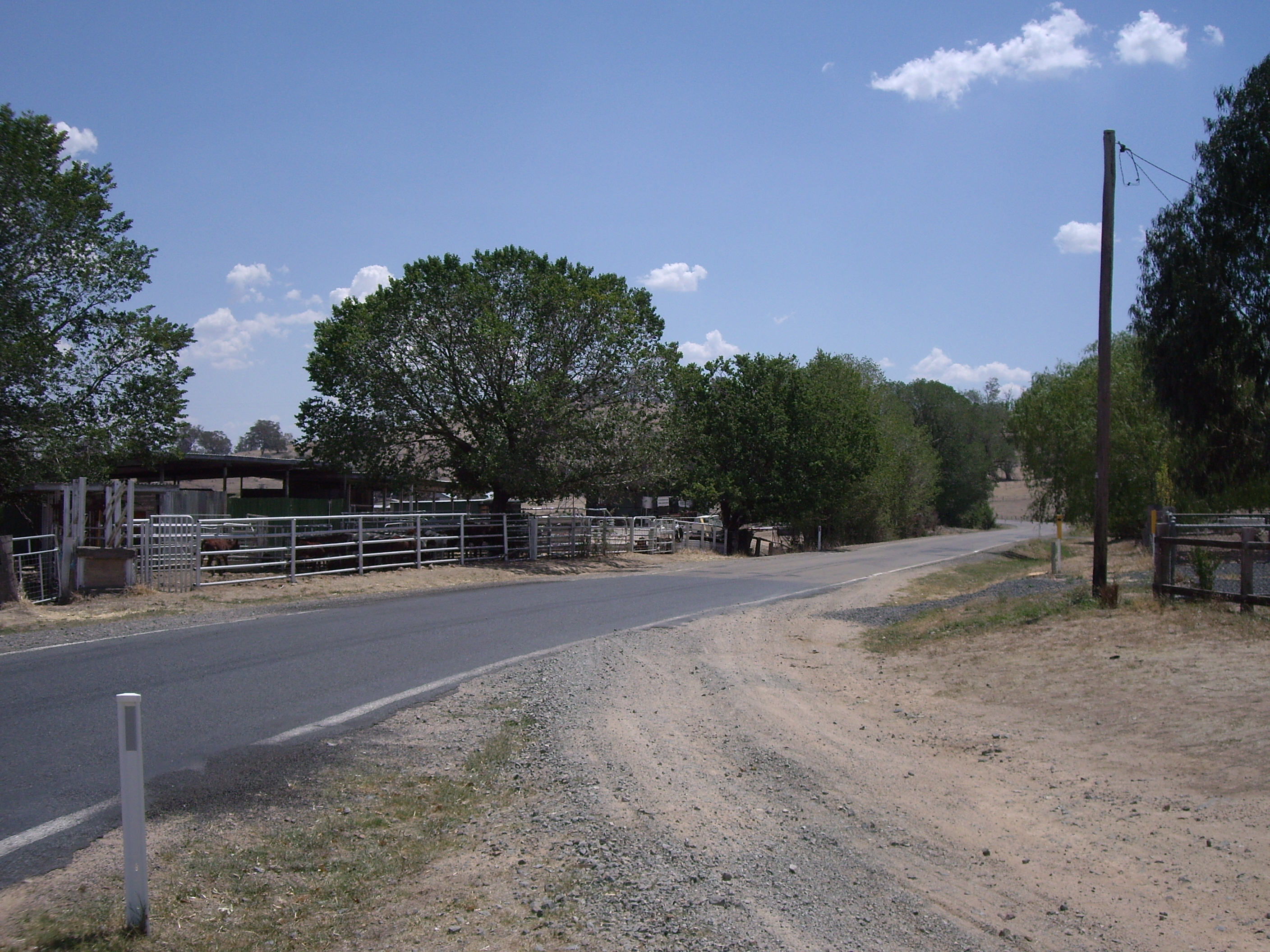 Lacmalac